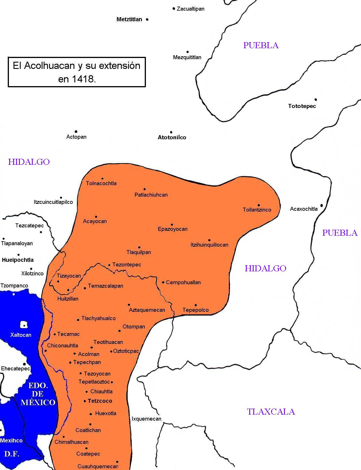 Ubicación de las poblaciones más importantes de la región del Acolhuacan en base a las fuentes. El mapa representa su extensión hasta 1418, cuando son sometidos por los tepanecas. El territorio acolhua será la región noriental del "Imperio mexica" que al momento de la conquista incluía el Totonacapan, es decir, la región del Golfo de México.